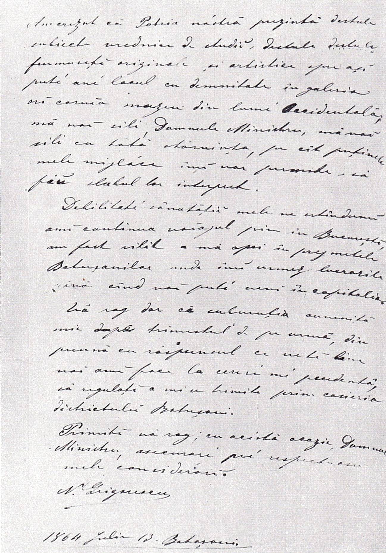 Pagină dintr-o scrisoare trimisă ministerului în 13 aprilie 1864